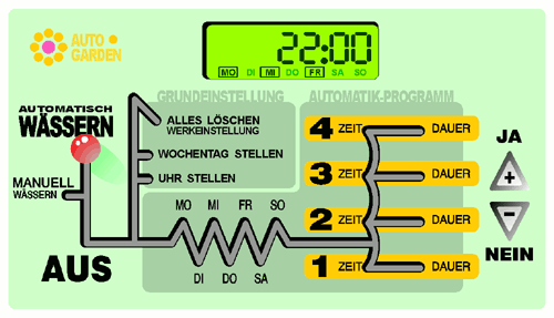 Beispiel einer einfachen automatischen Bewässerungs-Steuerung